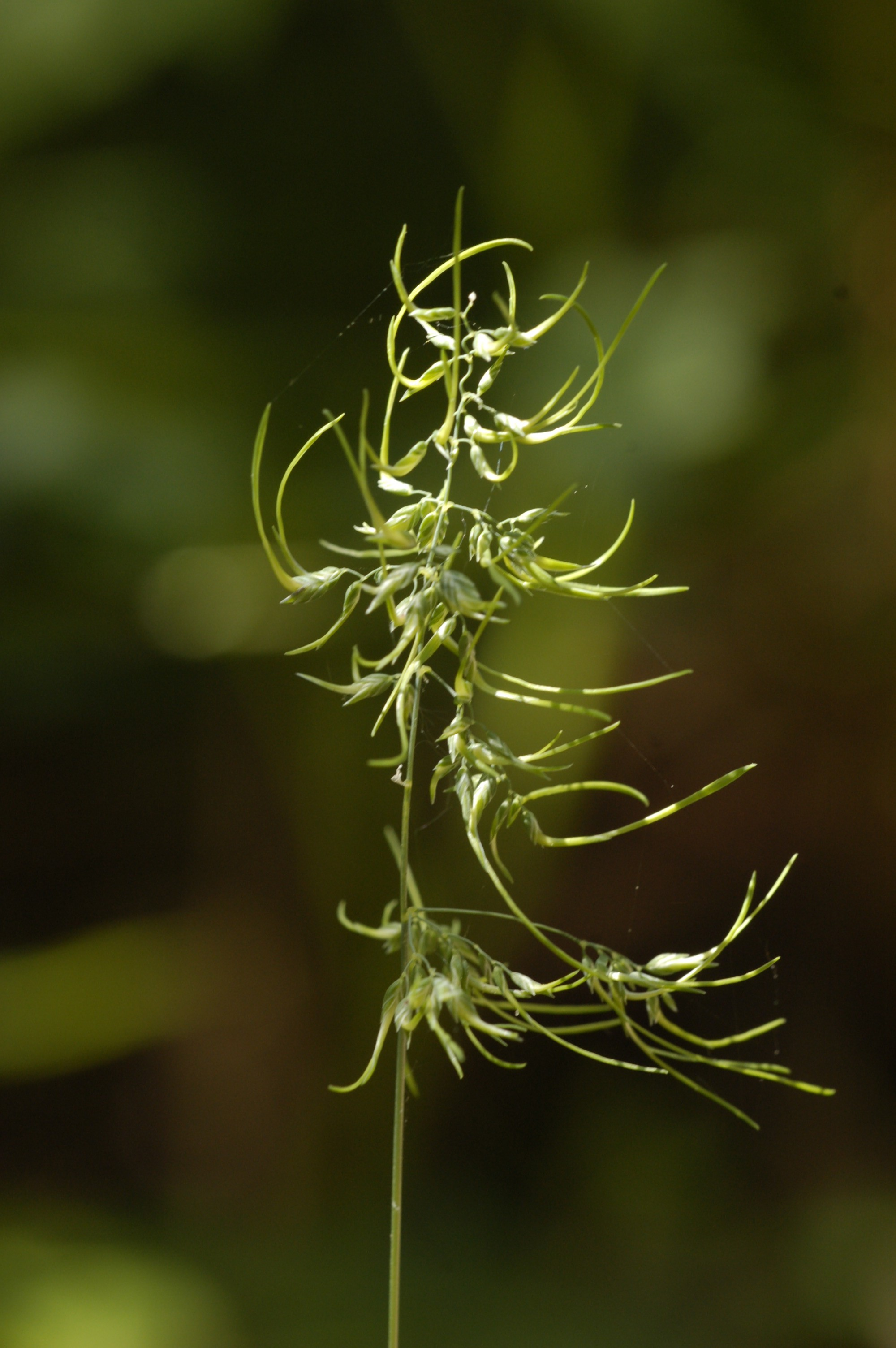 Knolliges Rispengras (Poa bulbosa)